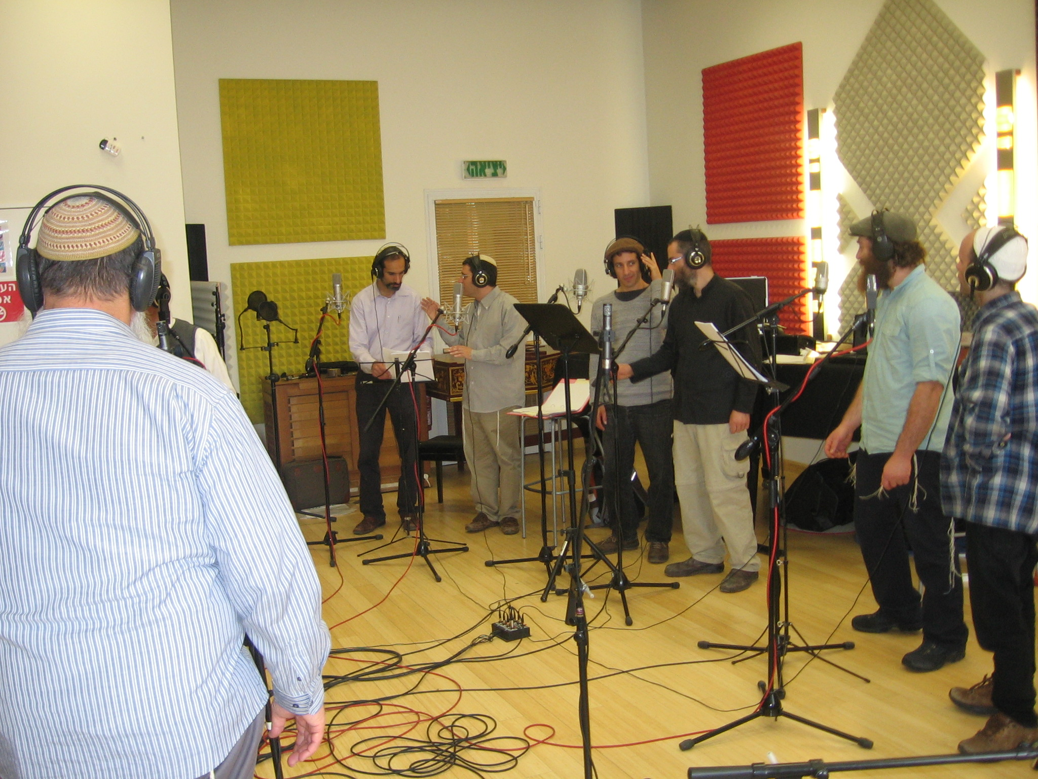 תיאטרון אודיו אבות האומה